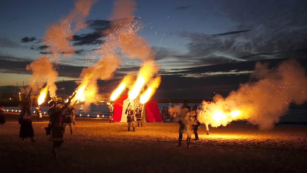 Fiestas de Moros y Cristianos de 2006 en Campello (provincia de Alicante, España).